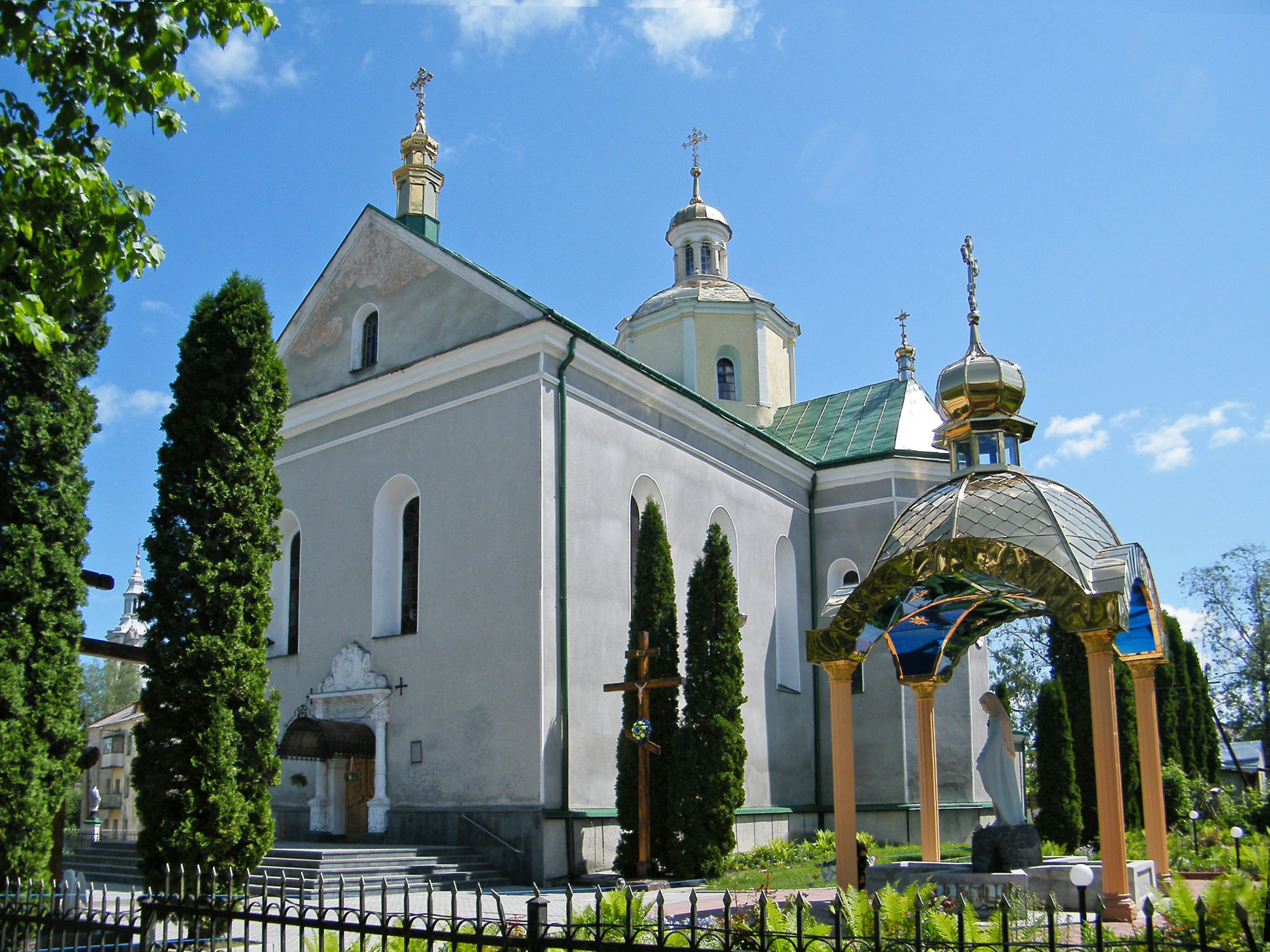 Воскресенская церковь